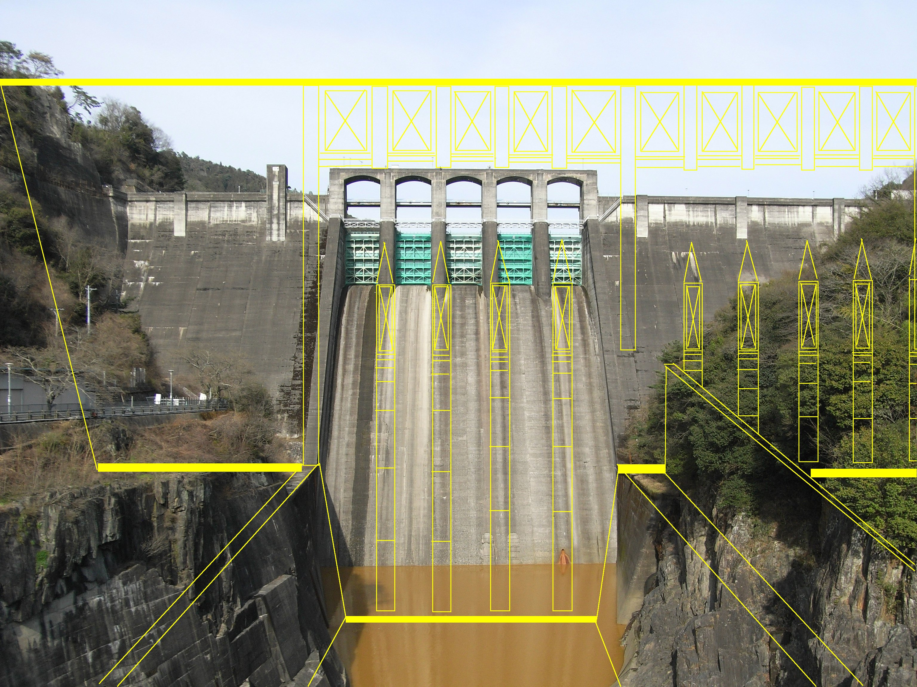 Dam